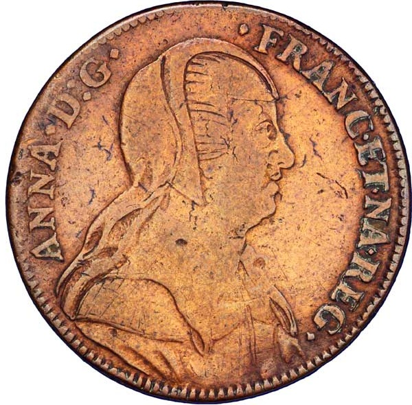 Jeton dont l’avers est à l’effigie d’Anne d’Autriche et le revers à celle de Louis XIV, années 1643-1646